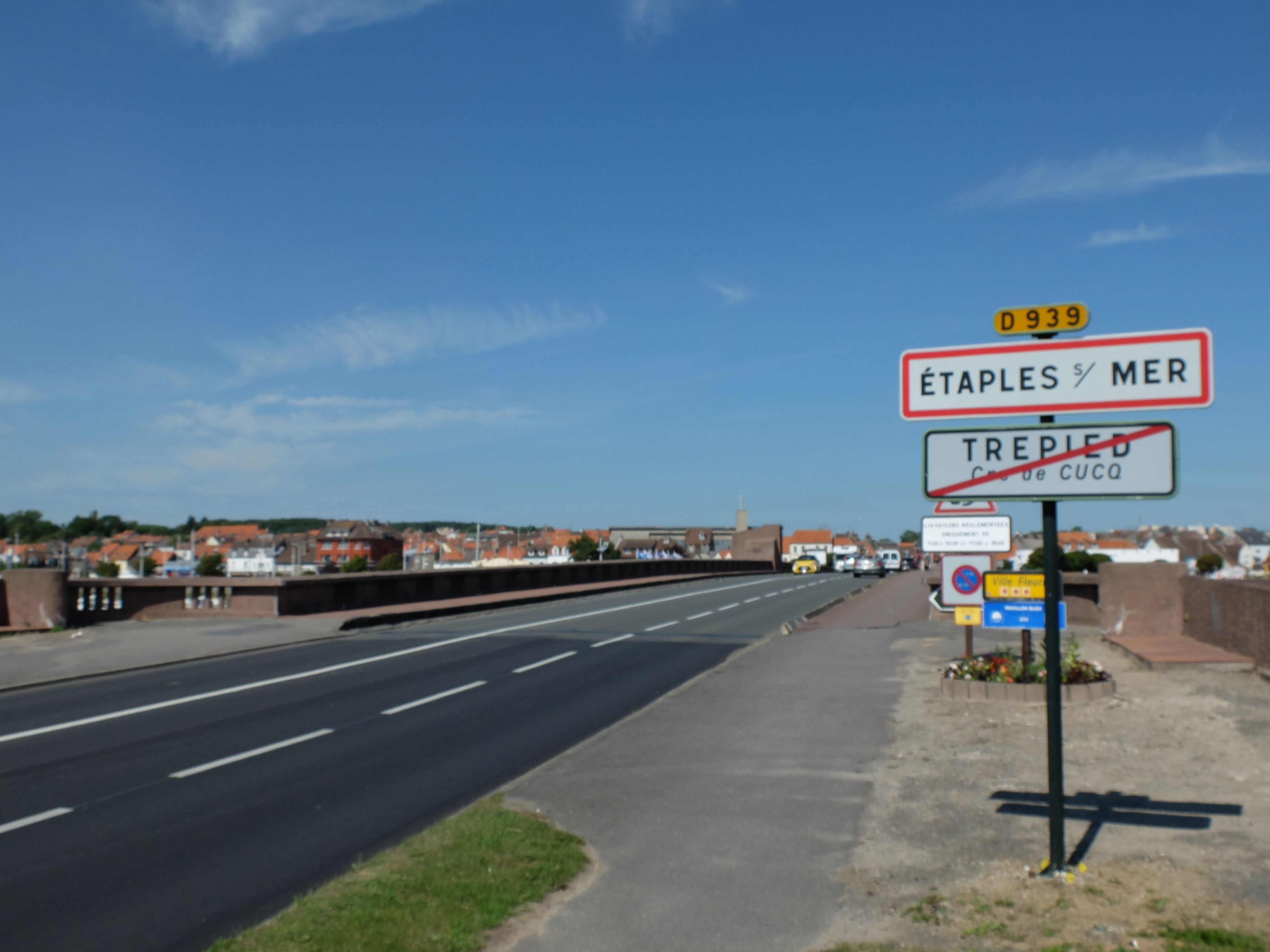 Vue d'une entrée d'Étaples. Derrière, le pont rose puis la commune sont visibles.